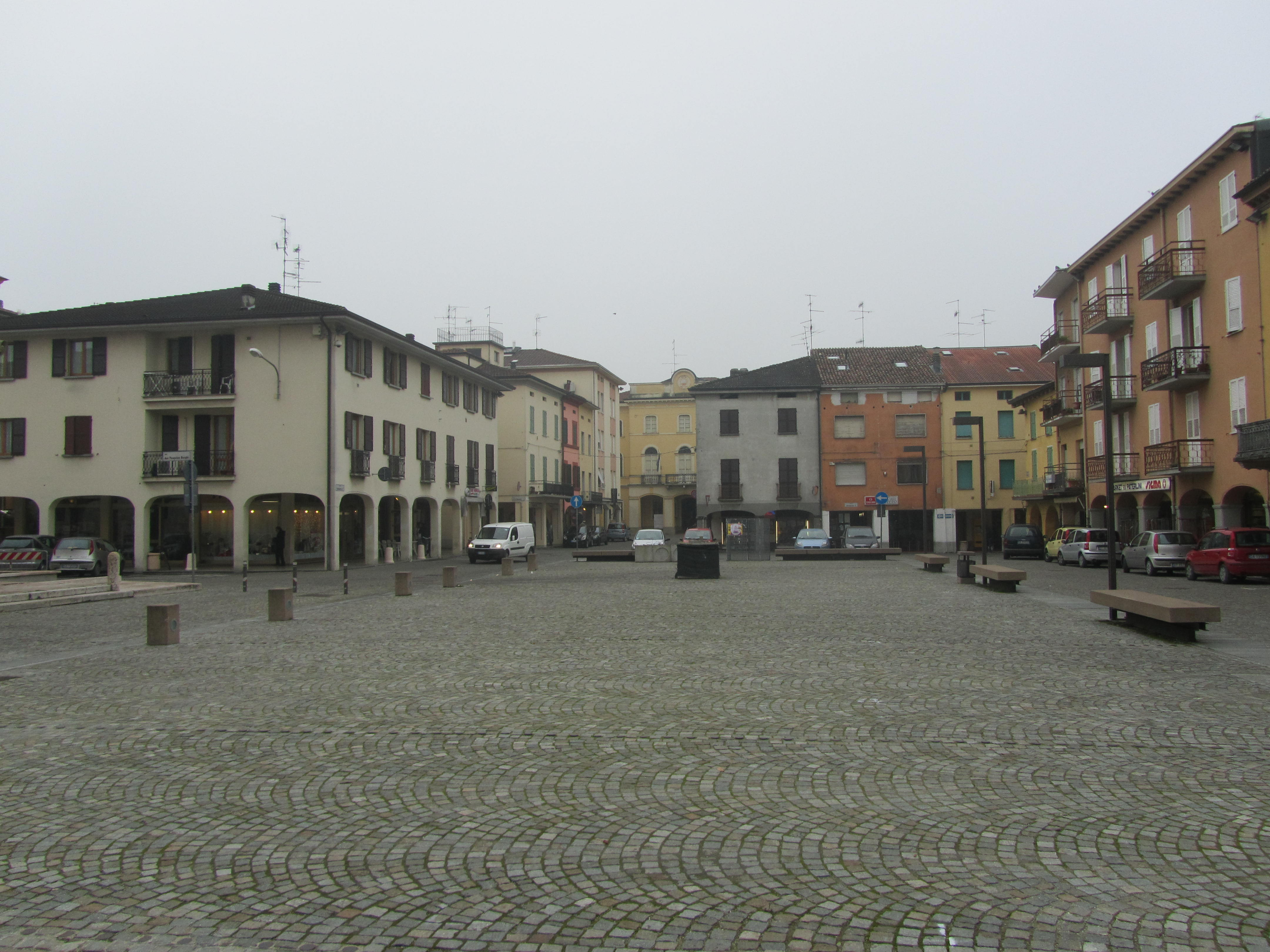 Piazza Umberto I, Poviglio, provincia di Reggio Emilia.